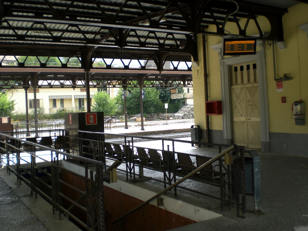 Stazine di Vaiano